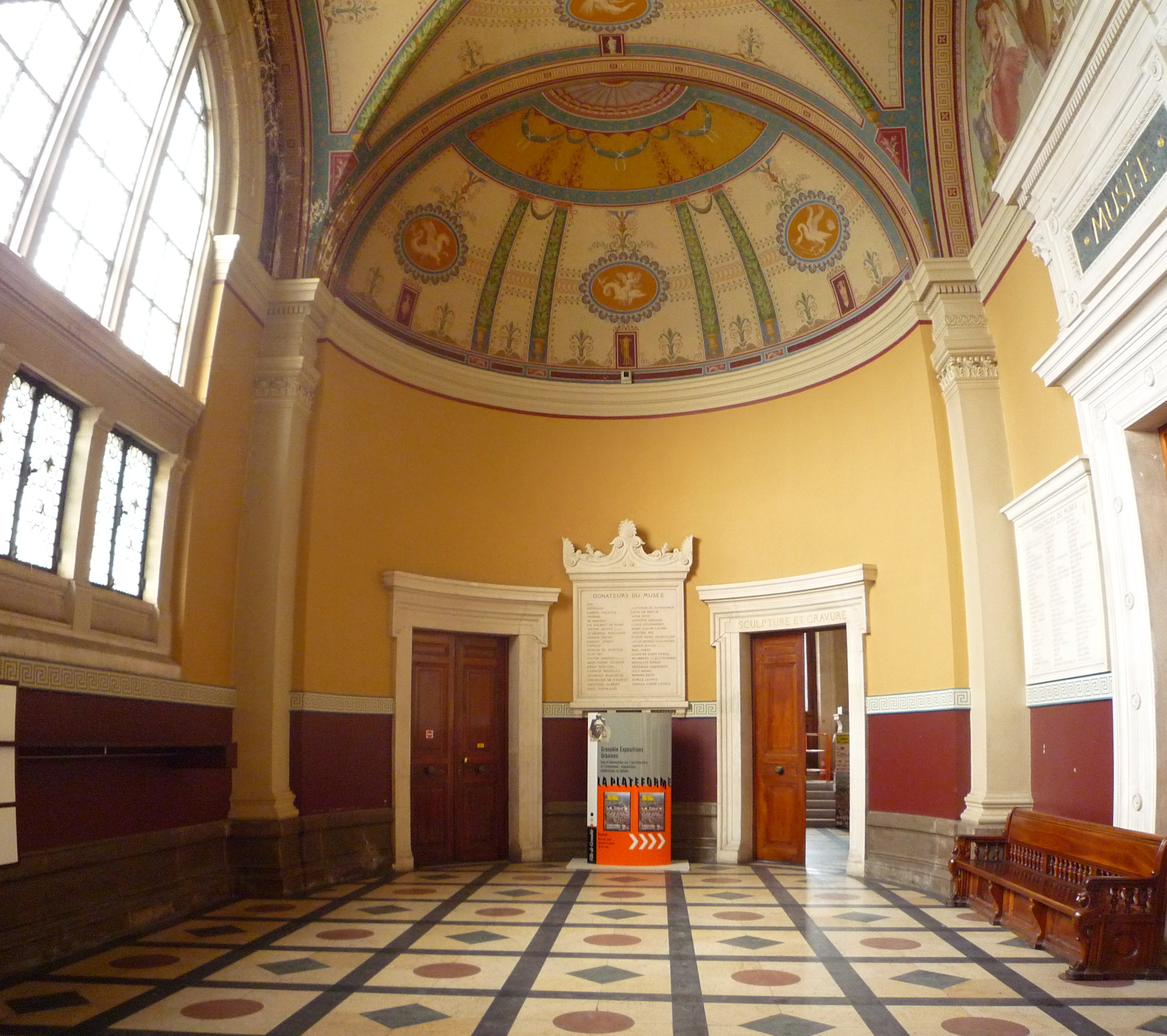 Vestibule, côté plateforme, musée-bibliothèque de Grenoble (1872).